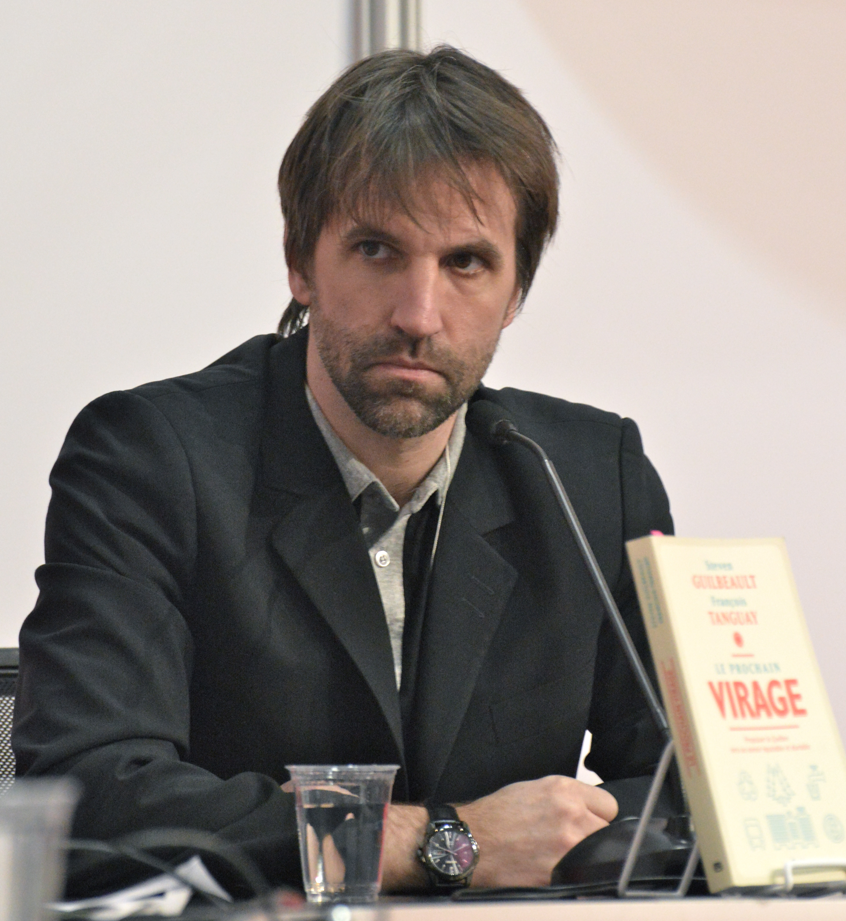 Steven Guilbeault au Salon international du livre de Québec 2014